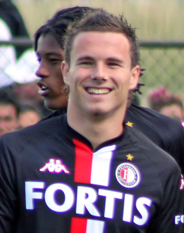 Jordy Buijs (Feyenoord)